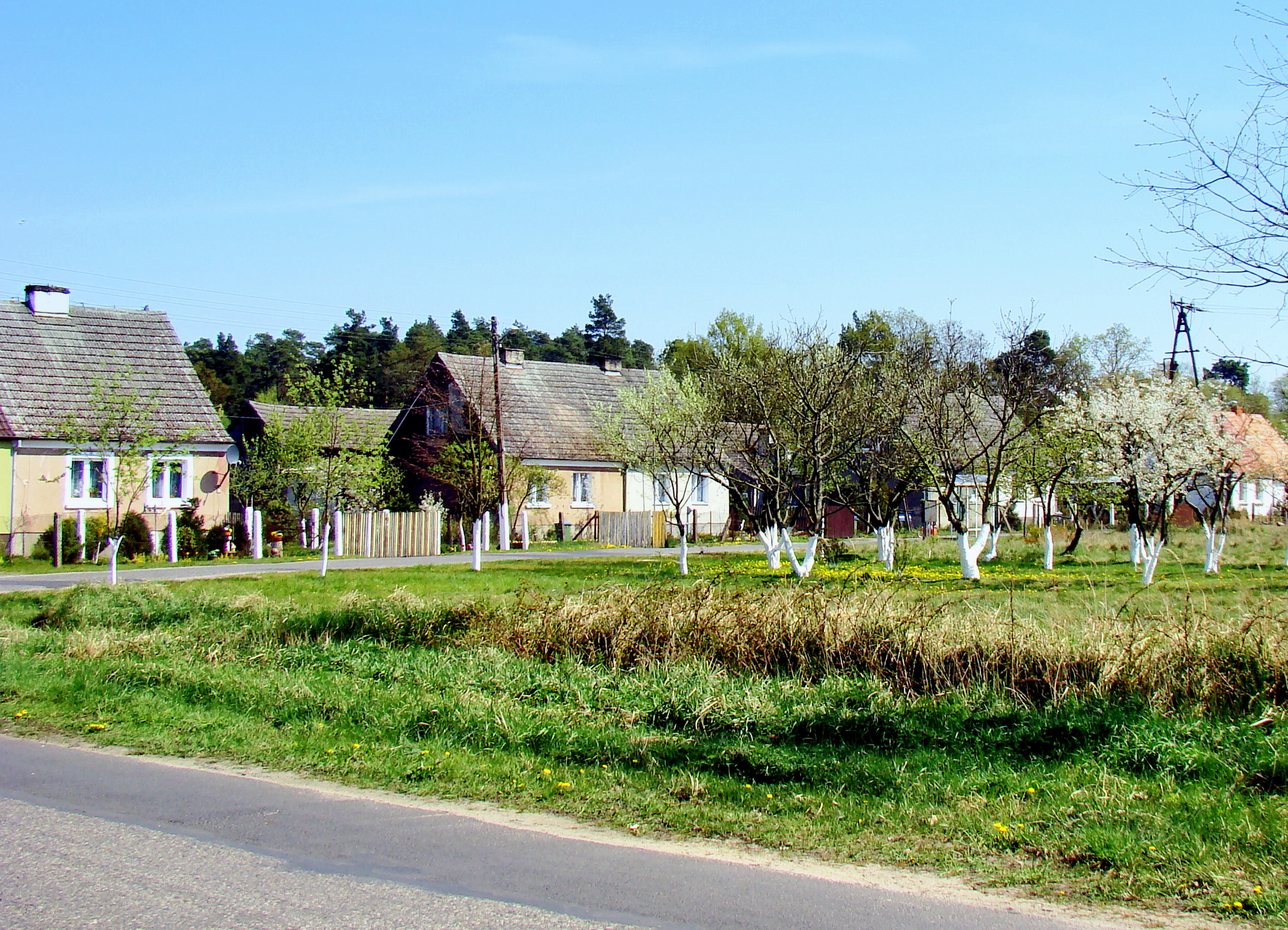 Drogoradz, (Gmina Police, Powiat policki, Województwo zachodniopomorskie), Polska